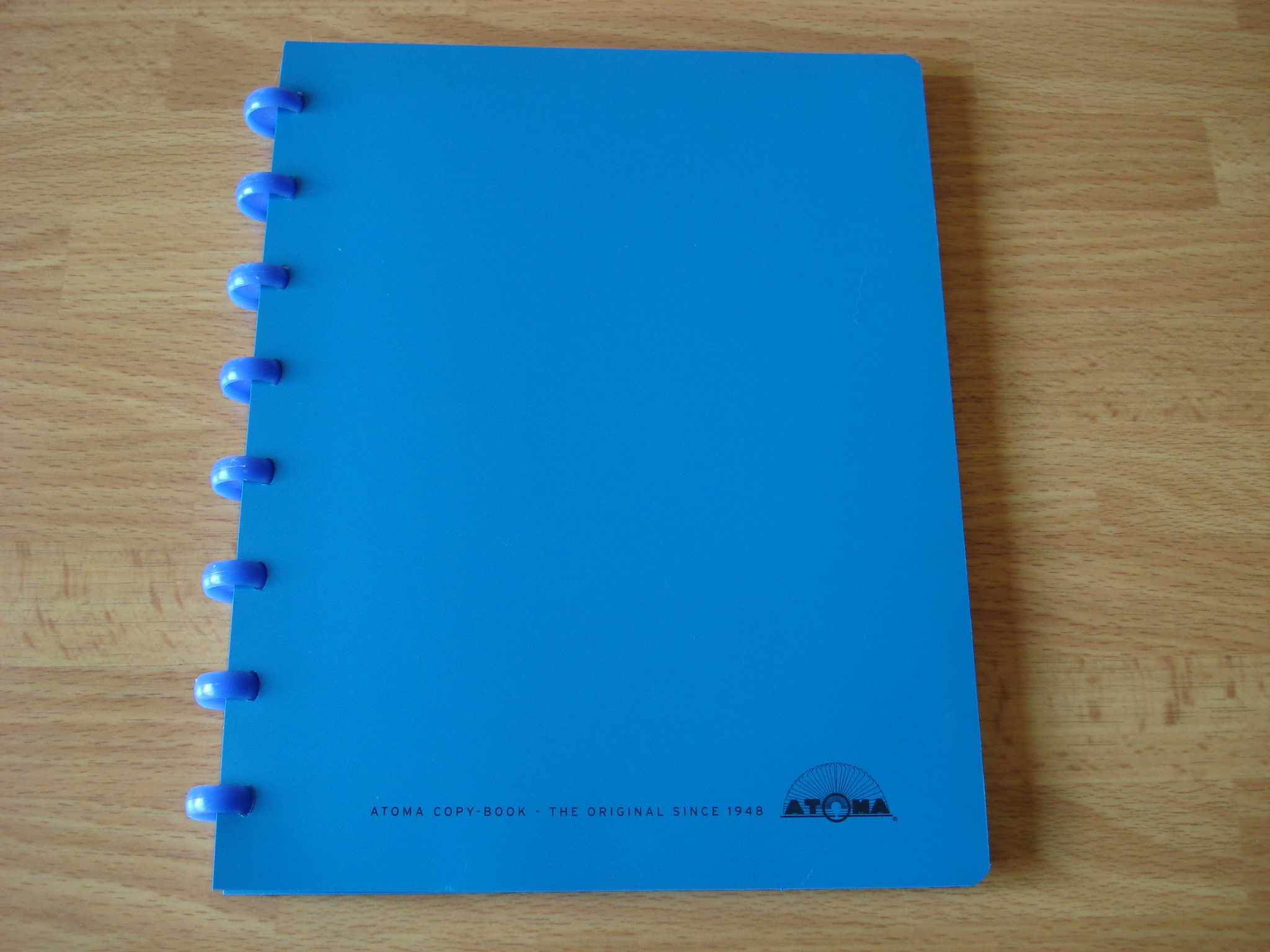 carnet avec anneaux